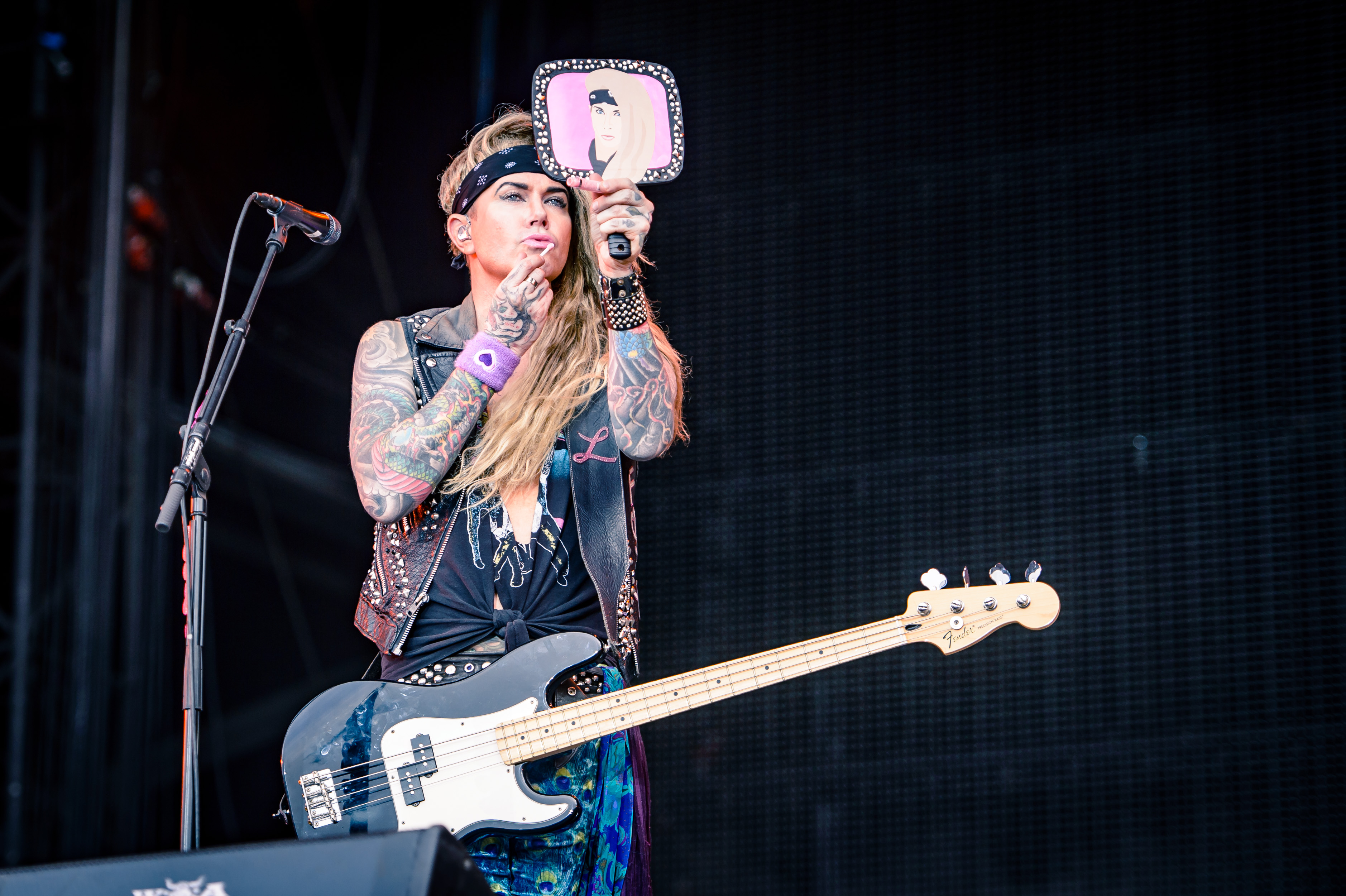 'Wacken Open Air 2018': 'Steel Panther'